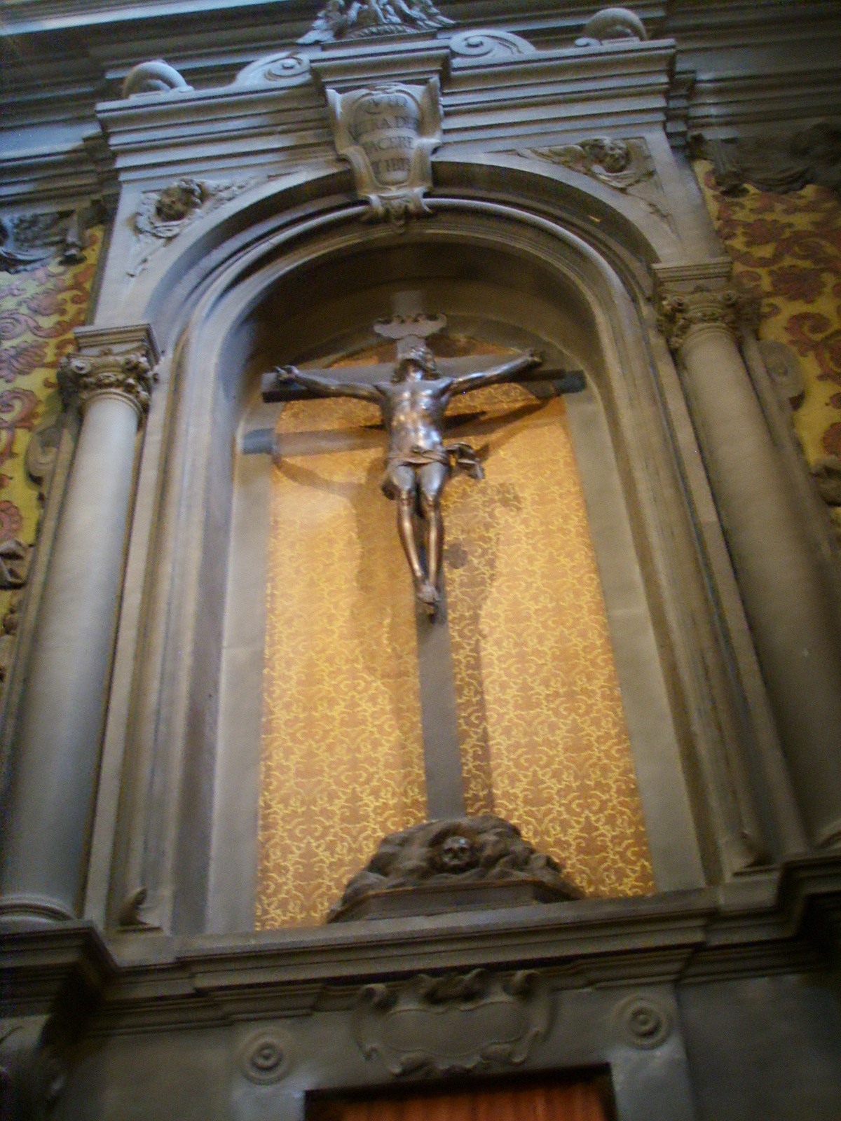 Chiesa di san gaetano, crocifisso di giovan francesco susini